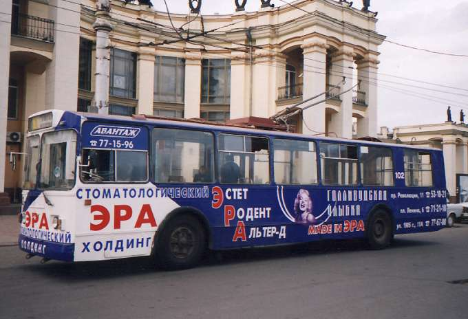 Троллейбус у Вокзала Воронеж-1